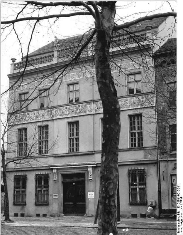 Zentralbild-Brüggmann- 1.8.1964 Berlin: Ermeler-Haus in der Breite Straße im Stadtzentrum, eines der ältesten Berliner Häuser.